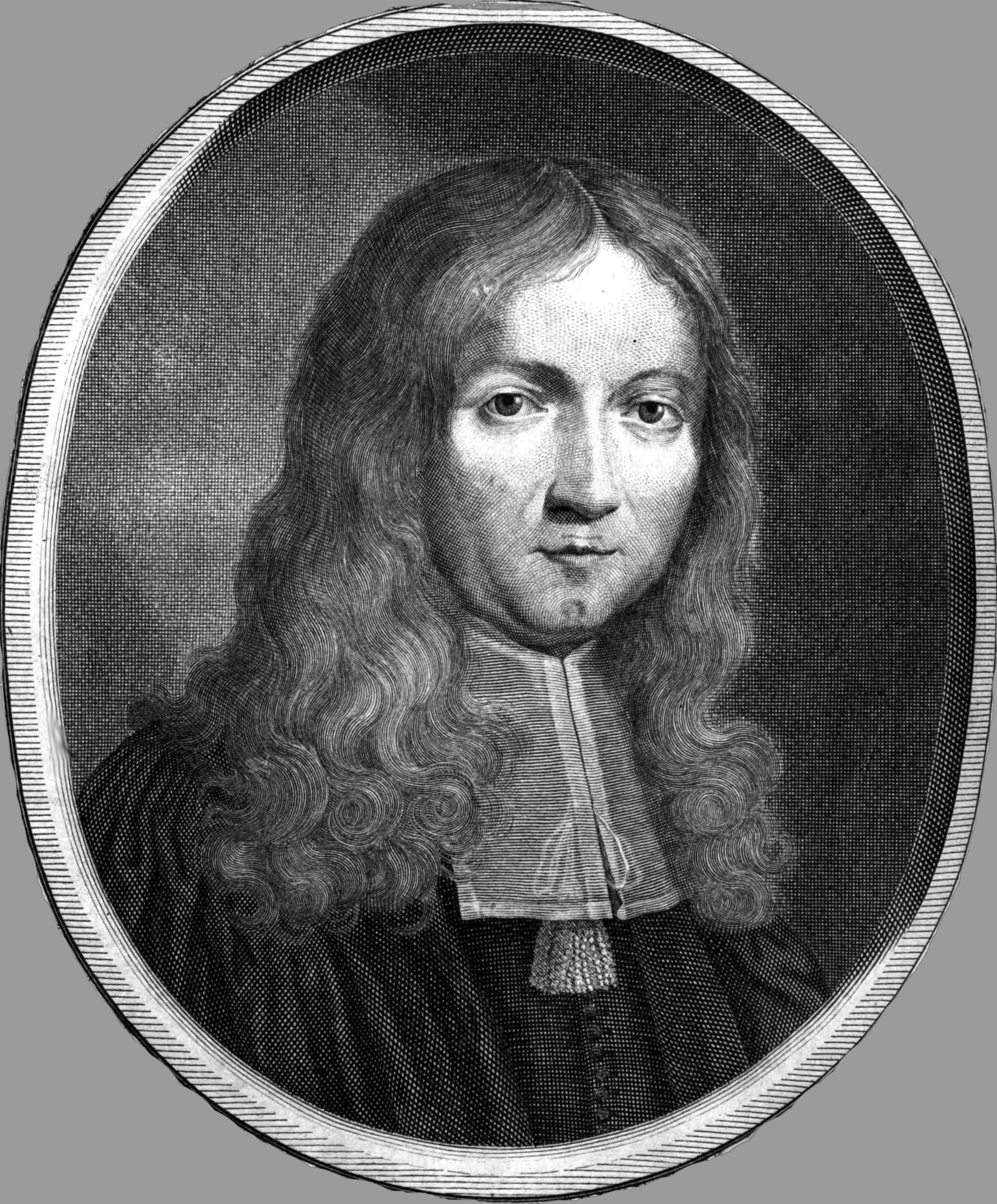 Autorenbild